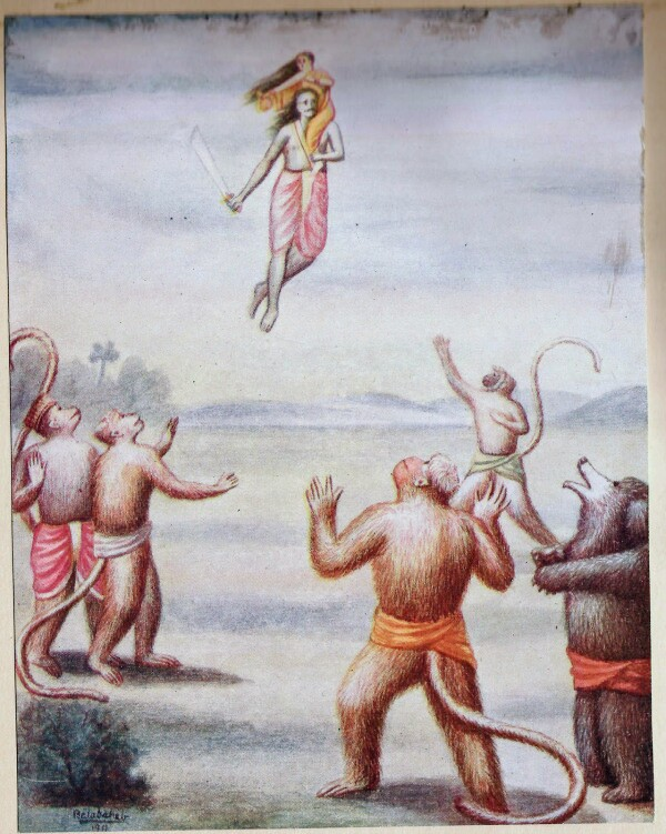 Chitra Ramayana (Illustrated Ramayana) is a simplified story of the great Indian epic in Kannada. The type is bold and beautiful. The thick pages have become brittle and need careful handling. Printed by B. Miller, Superintendent, British India, Press, Mazgaon, Bombay. It was published by, Shrimat Balasaheb Pandit Pant Pratinidhi, chief of Aundh, at Aundh, Satara district. The Kannada version is by Ramachandra Madhwa Mahishi The date shown is 1916. It is all the more important because the book contains illustrations painted by the publisher also called Bhavan Rao Shrinivas Rao, the ruler of the state of Aundh himself.